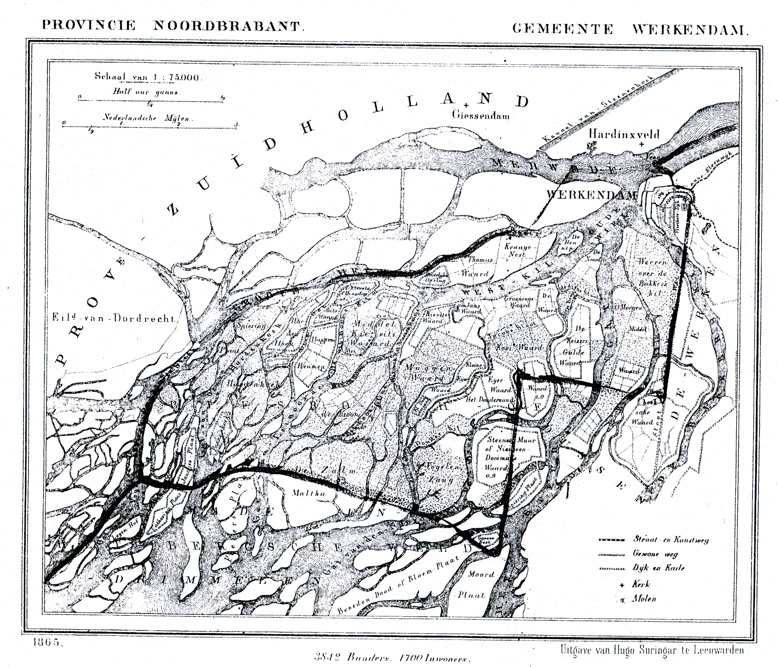 Nederland, Noord-Brabant, Gemeente Werkendam